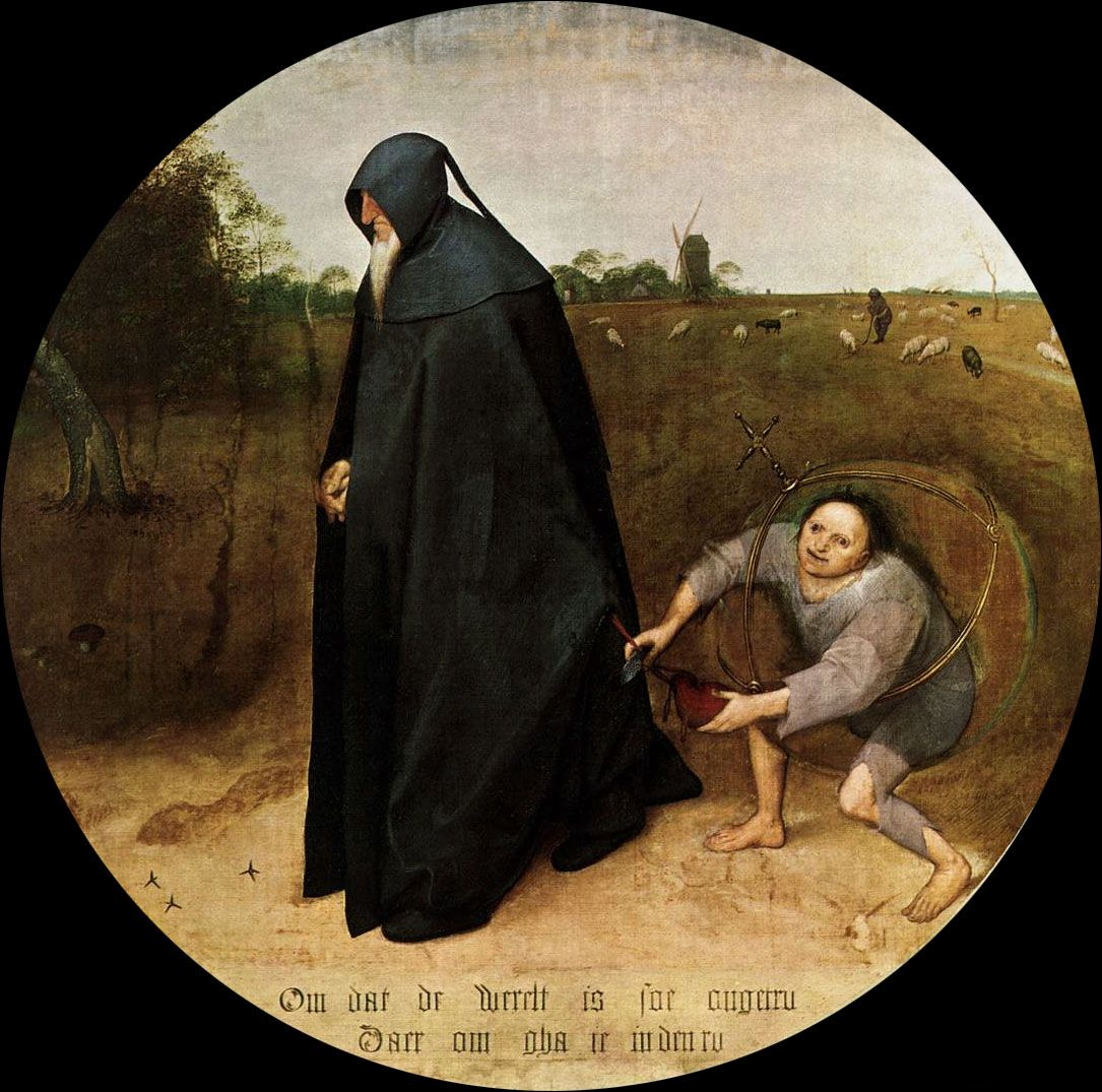 Брейгель Питер, Мизантроп, 1568